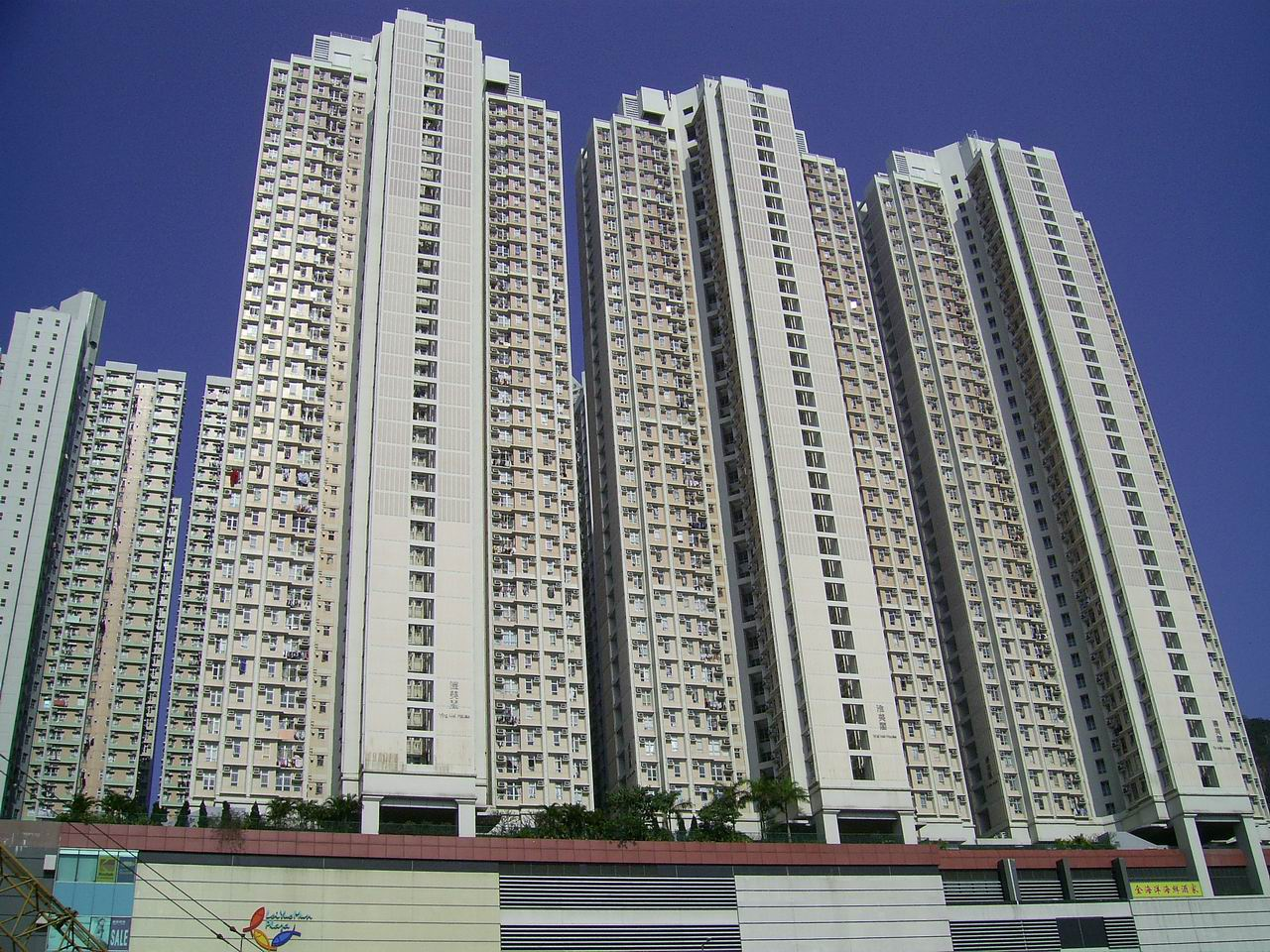 油美苑